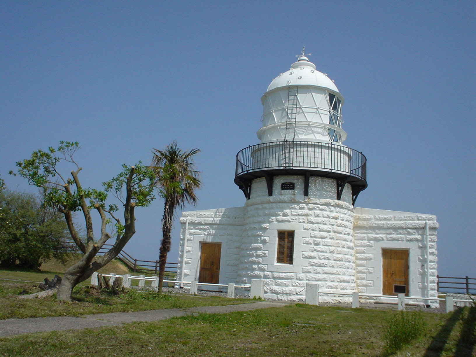 Rokkozaki Lighthouse (禄剛崎灯台 [ろっこうざき とうだい] 、石川県)